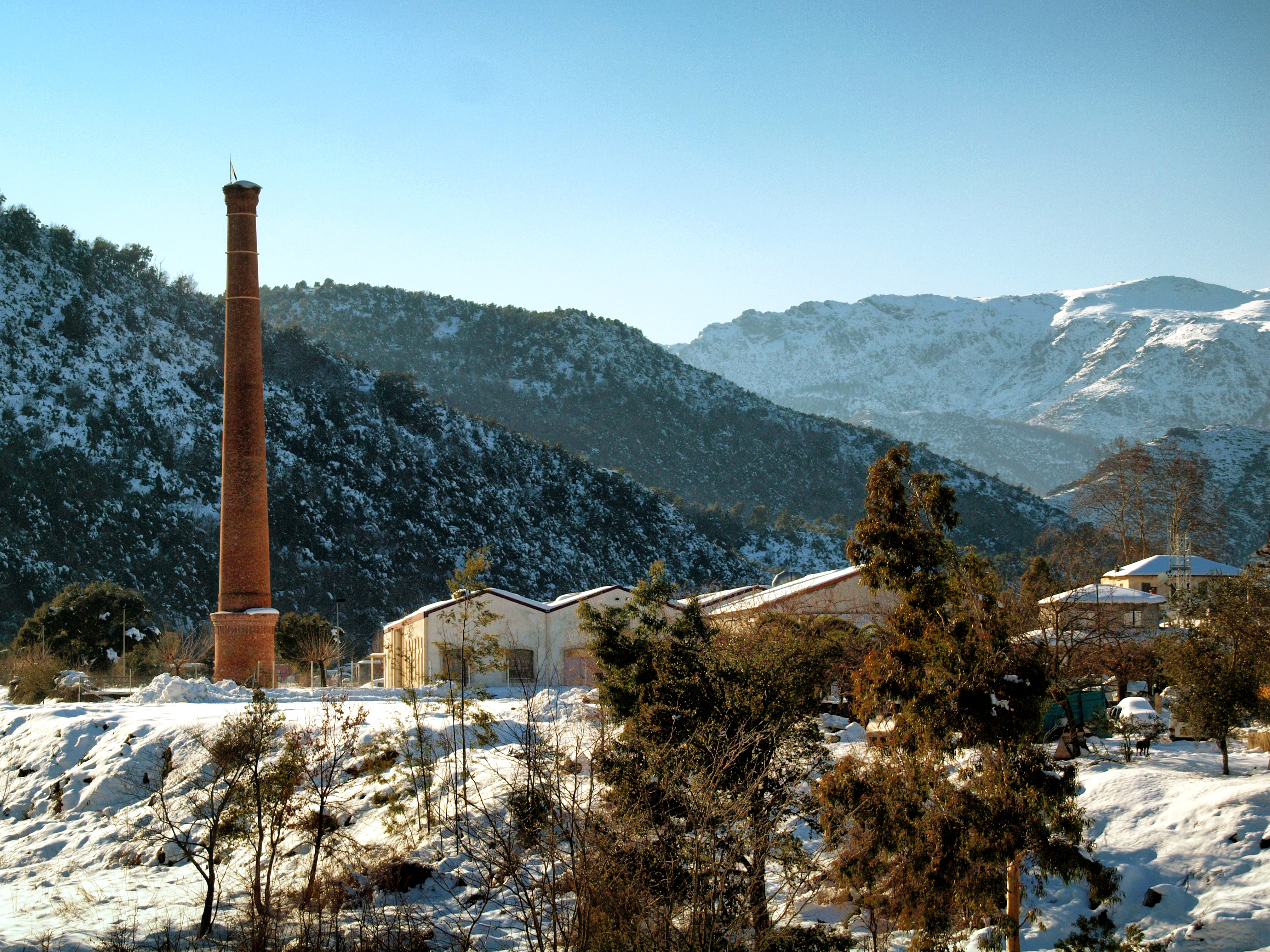 Volpajola, Costera (Corse) - Cheminée de l'usine de tannins de Barchetta